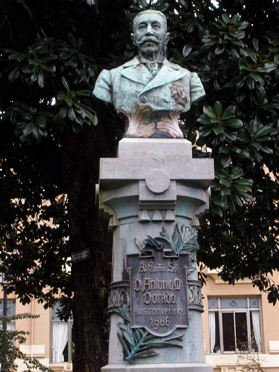 Paisaje urbano en Sama de Langreo (Asturias)